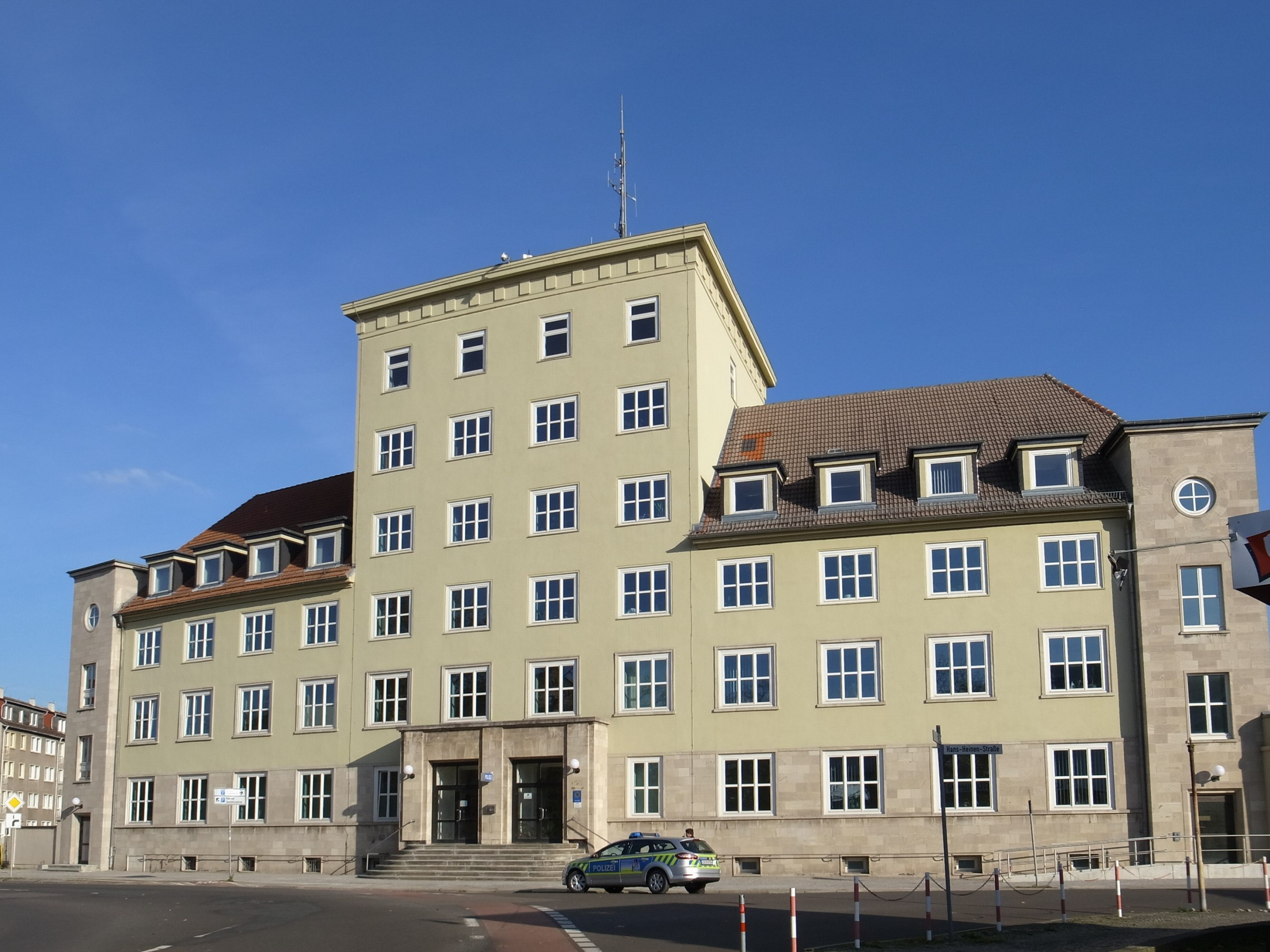 Dessau-Roßlau, Wolfgangstraße 25, Polizeipräsidium (Baudenkmal im Denkmalverzeichniss Sachsen-Anhalt, Erfassungsnummer: 094 40864 000 000 000 000 [1])